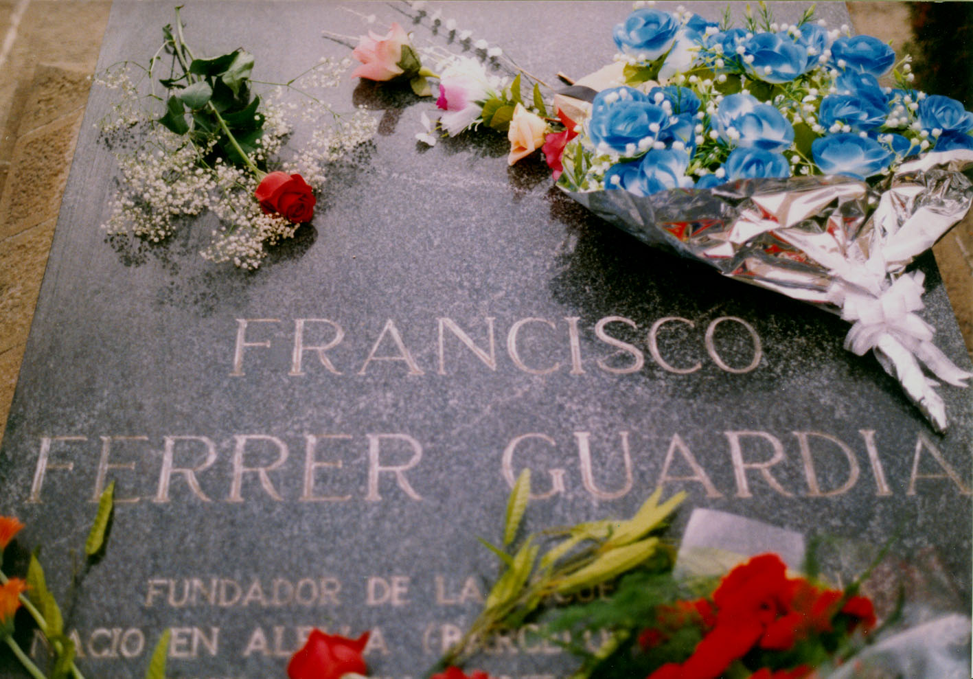 Cementiri Montjuïc, tomba de Francesc Ferrer i Guàrdia (Alella, 10 de gener de 1859 - Barcelona, 13 d'octubre de 1909) fou un important pedagog català.